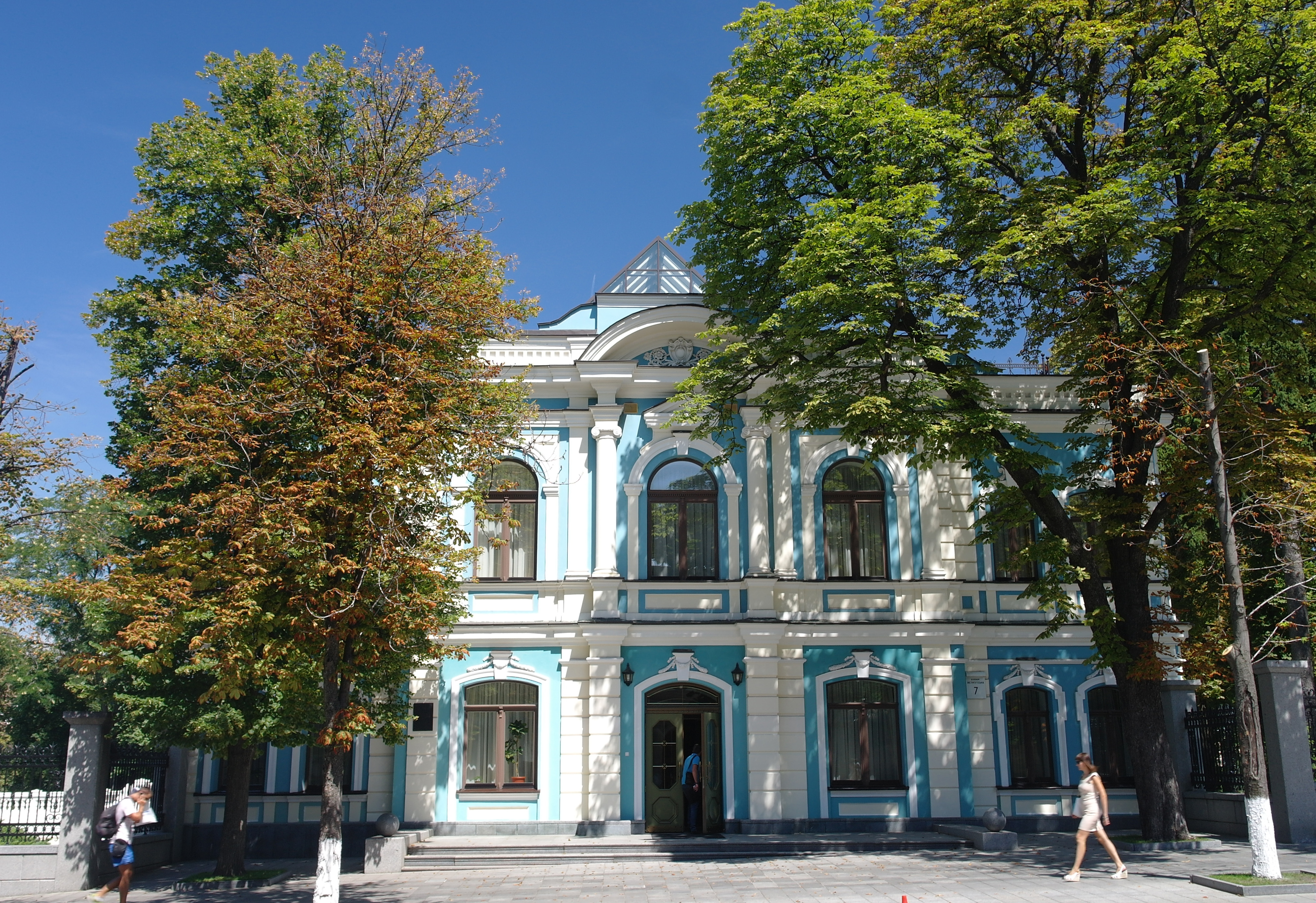 Київ, Інститутська вул., 7